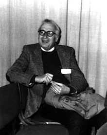 Lo scrittore e traduttore di fantascienza italiano Sandro Sandrelli (1926-2000) alla Italcon di Borgomanero nel 1973.